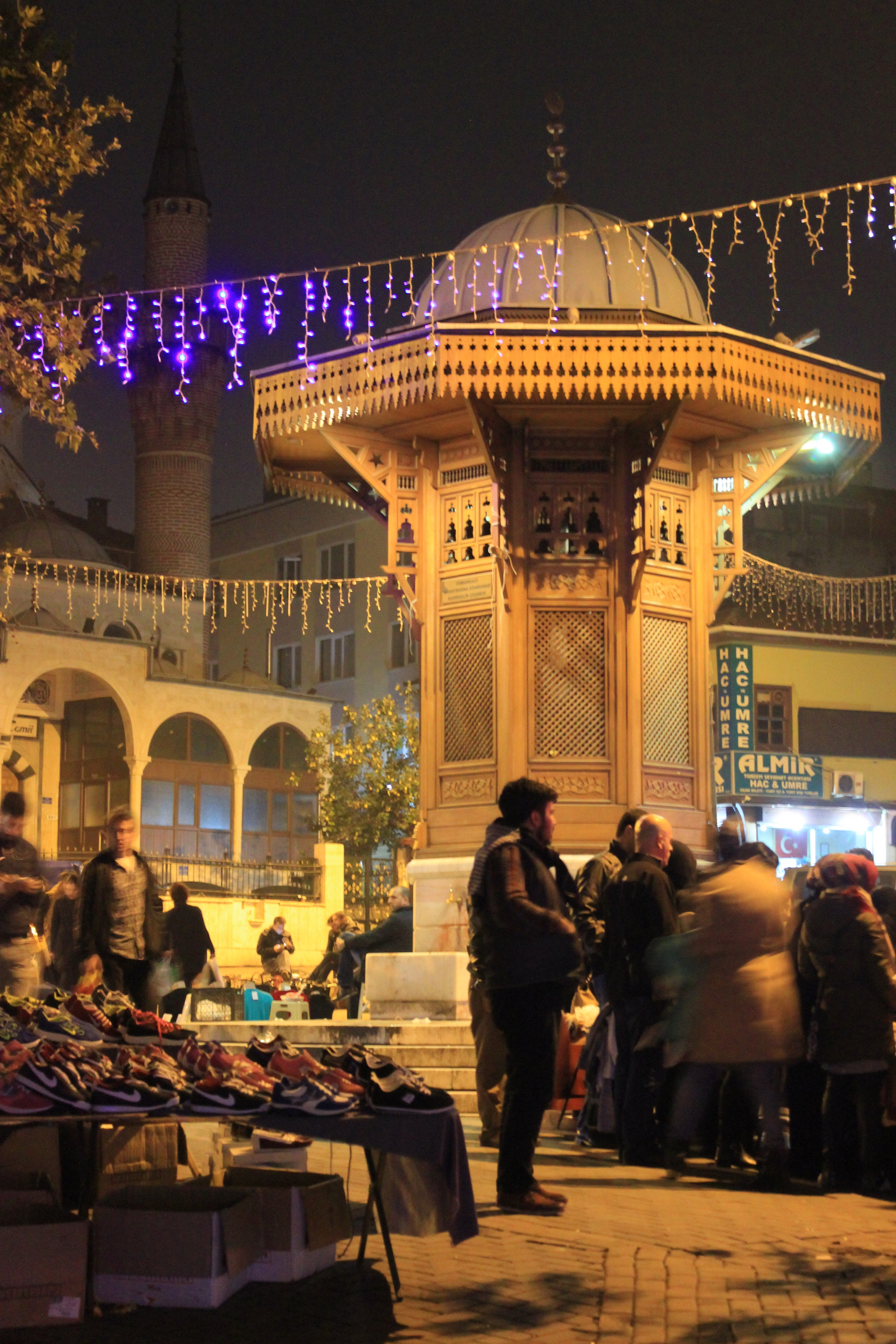 Nachbau der Sarajevoer Sebilj in der Partnerstadt Bursa.